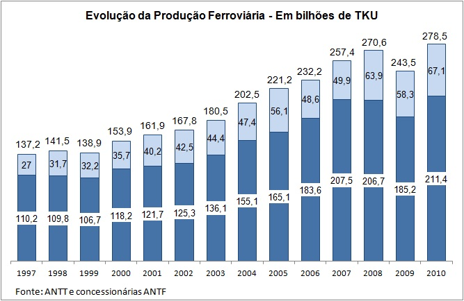 Evolução da produção ferroviária do Brasil desde a privatização em 1997 até 2010, segundo dados da ANTT e da ANTF publicado no Balanço do Transporte Ferroviário de Cargas de 2010. Em azul claro, a evolução das cargas gerais transportadas e em azul escuro a evolução do minério de ferro e carvão mineral transportado.